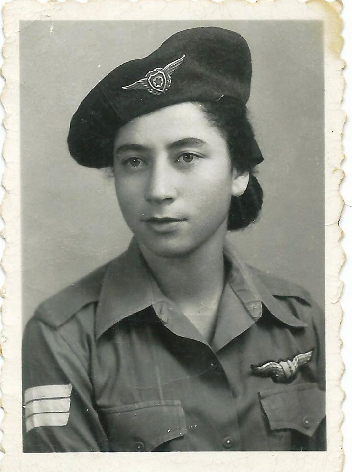 אלחוטנית אוויר צמחוני אהליה